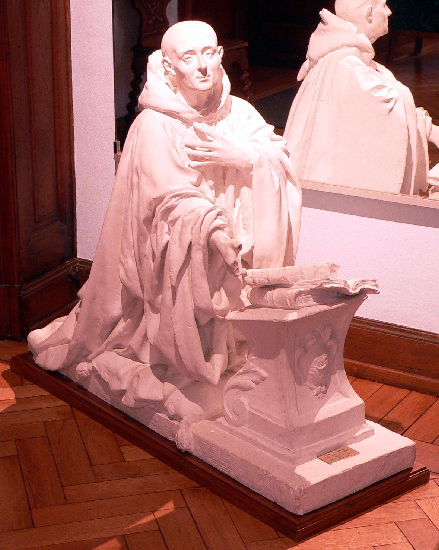 Don Augustin Calmet (* 26. Februar 1672 in Ménil-la-Horgne bei Commercy) im Herzogtum Lothringen; † 25. Oktober 1757 in Senones) war ein römisch-katholischer Theologe, Gelehrter und Abt des Benediktinerordens von Senones/Vogesen.